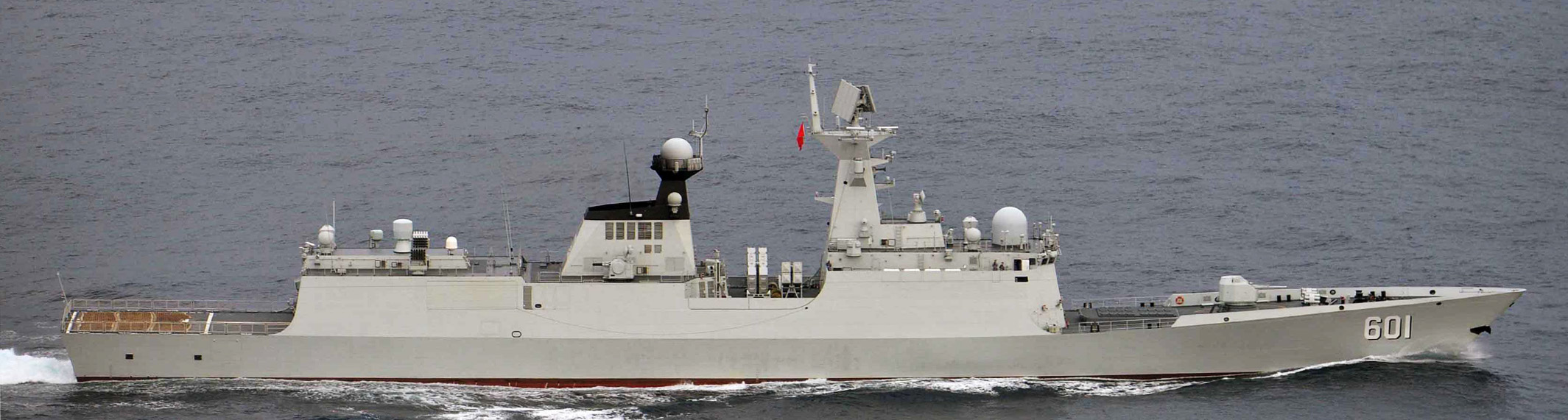 １１月２７日（水）午前８時半頃、海上自衛隊第１航空群所属「Ｐ－３Ｃ」（鹿屋）が、口永良部島（鹿児島県）の西約１００ｋｍの海域を東進する中国海軍ルーヤンⅢ級ミサイル駆逐艦１隻、ジャンカイⅡ級フリゲート２隻及びフチ級補給艦１隻の合計４隻を確認した。 その後、これらの艦艇が大隅海峡を東進し、太平洋へ向けて航行したことを確認した。